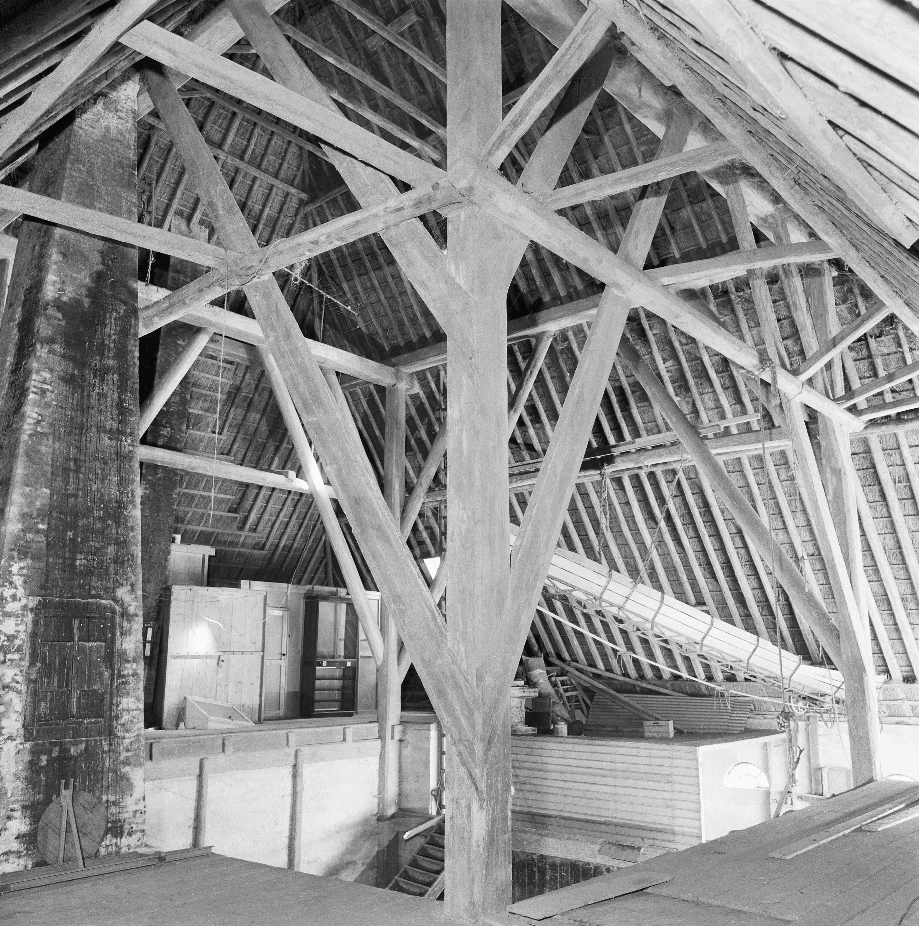 Boerderijen/ Kapconstructie: Interieur, kapconstructie schuur